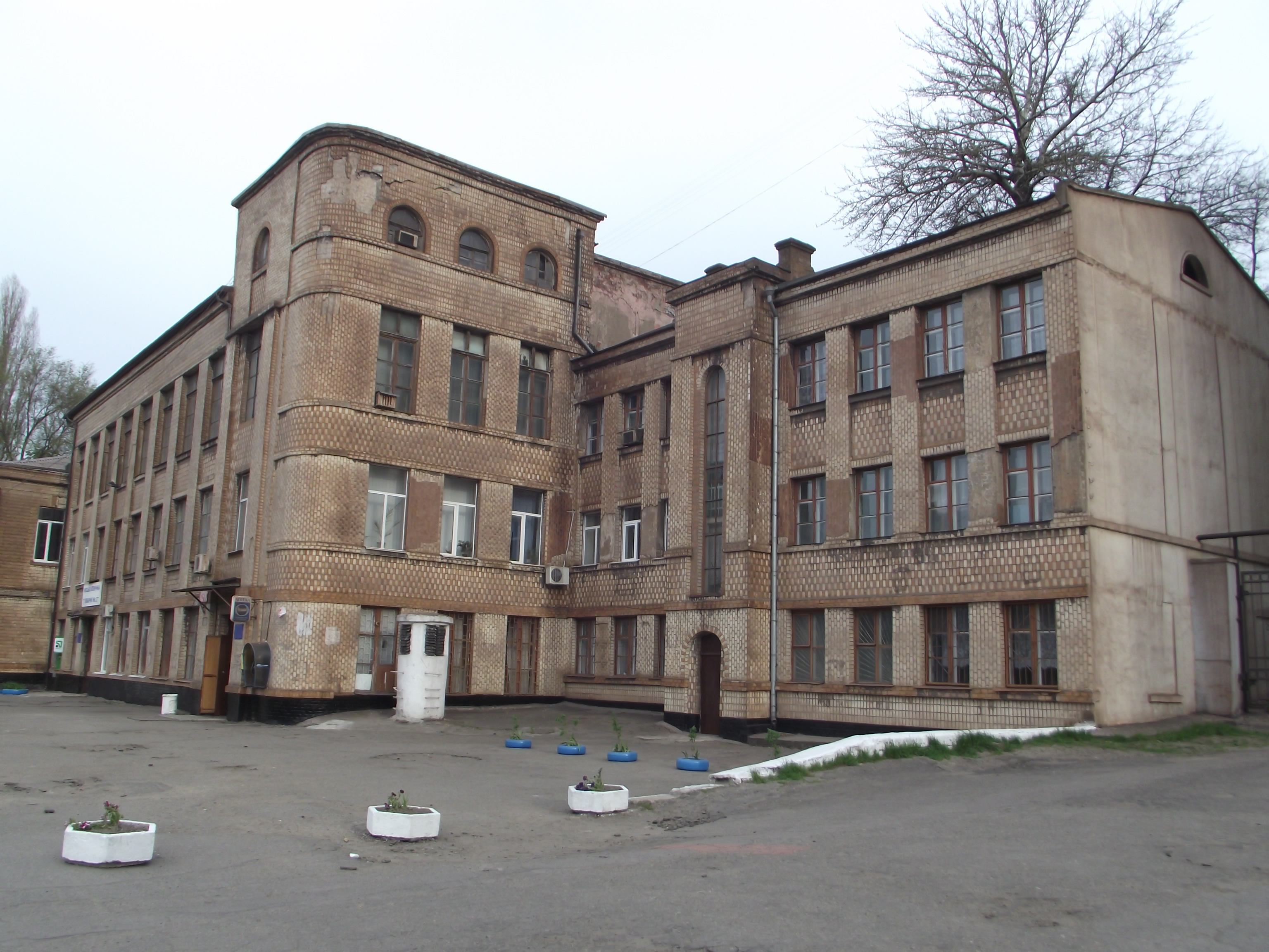 Палац профілактики, Дніпропетровськ, Калініна просп., 53 (кол. Профілактична вул., 1)